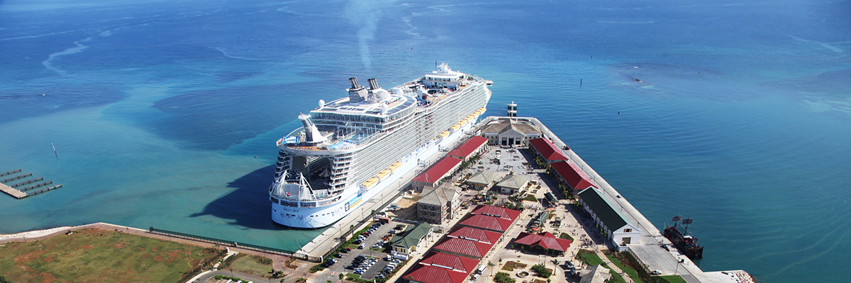 Picutre of Falmout port with cruiser.